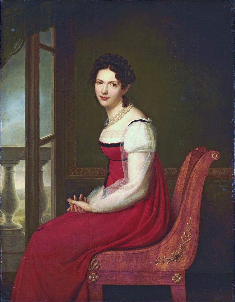 Варвара Сергеевна Долгорукая, урож. Гагарина (1793-1833), фрейлина, жена В.В.Долгорукого (1787-1858)